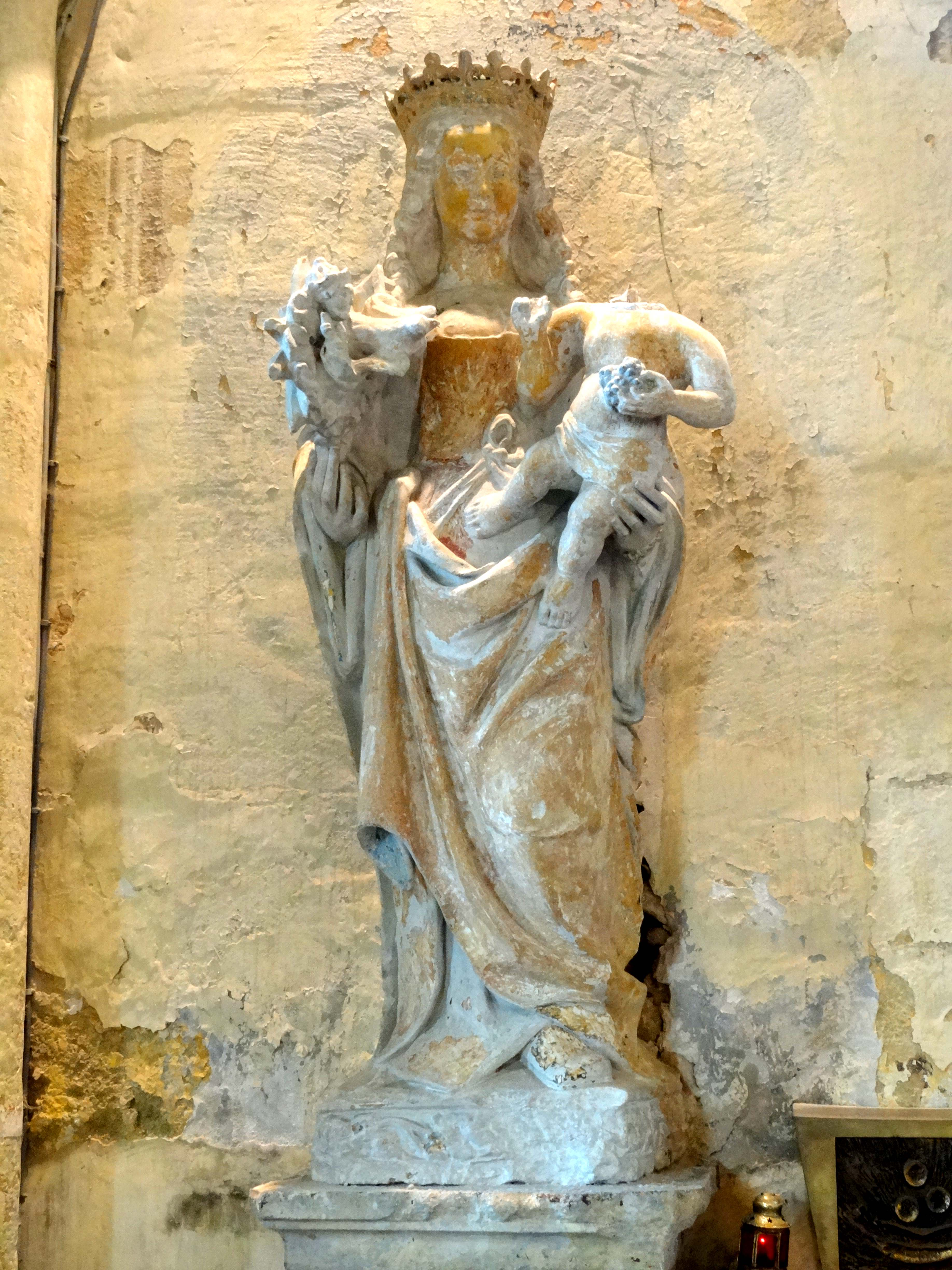 Mobilier de l'église - voir titre.